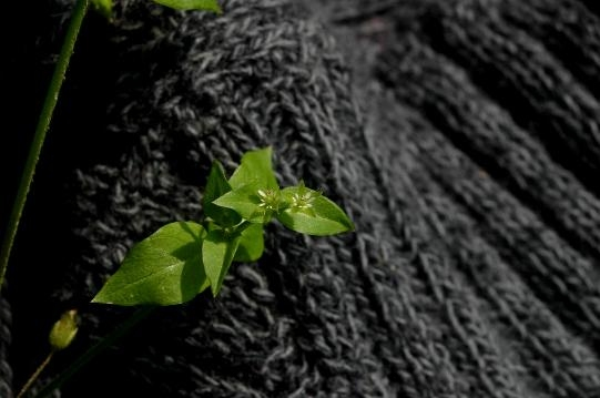 Stellaria media